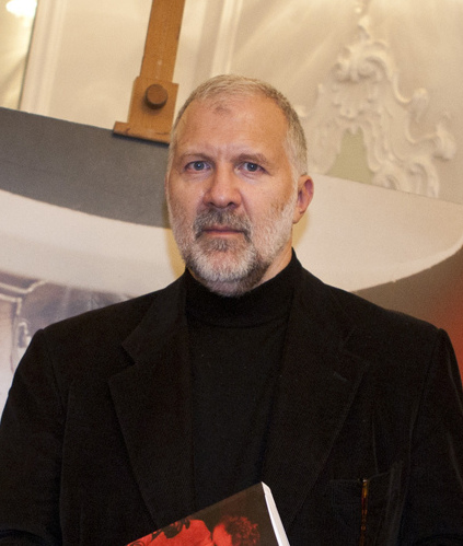 Massimo Picozzi